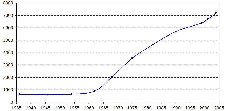 Evolution de la population de Saint-Genis-Pouilly depuis 1936